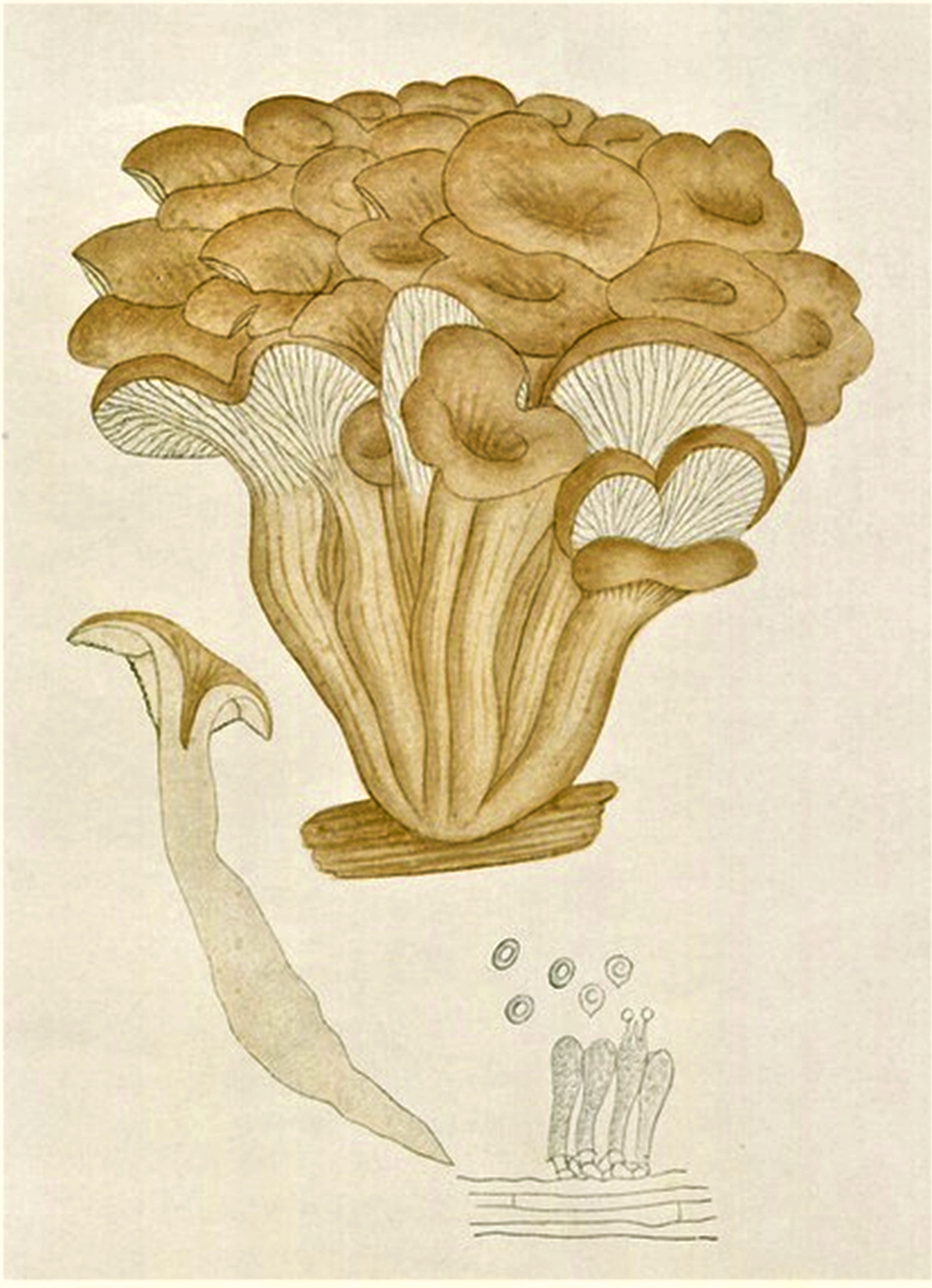 Giacomo Bresadola: Lentinus cochleatus (Pers., 1793) Fr. (1825), heute: Lentinellus cochleatus (Pers.) P.Karst. (1879)